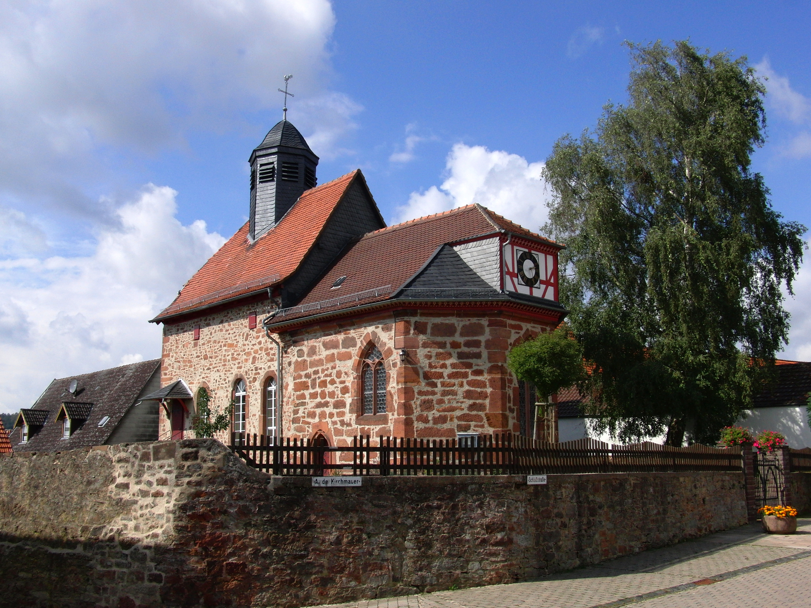 Kirche in Rommershausen, Schwalmstadt(Hessen)